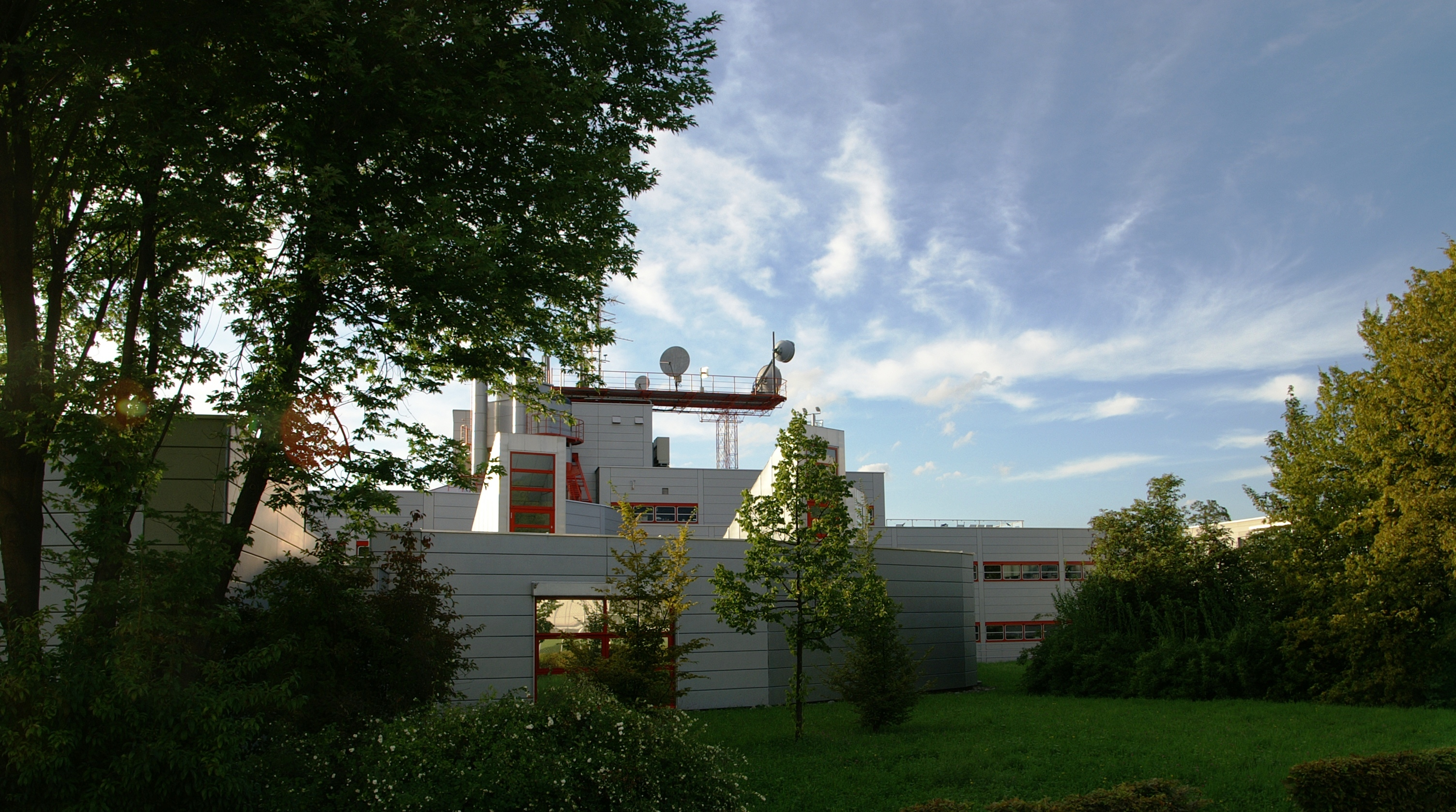 Österreichischer Rundfunk, ORF-Landesstudio Vorarlberg in Dornbirn. Ein Werk des Achitekten Gustav Peichl